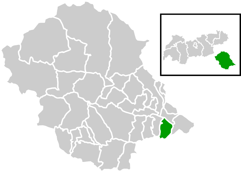 Lage der Gemeinde innerhalb des Bezirks Lienz